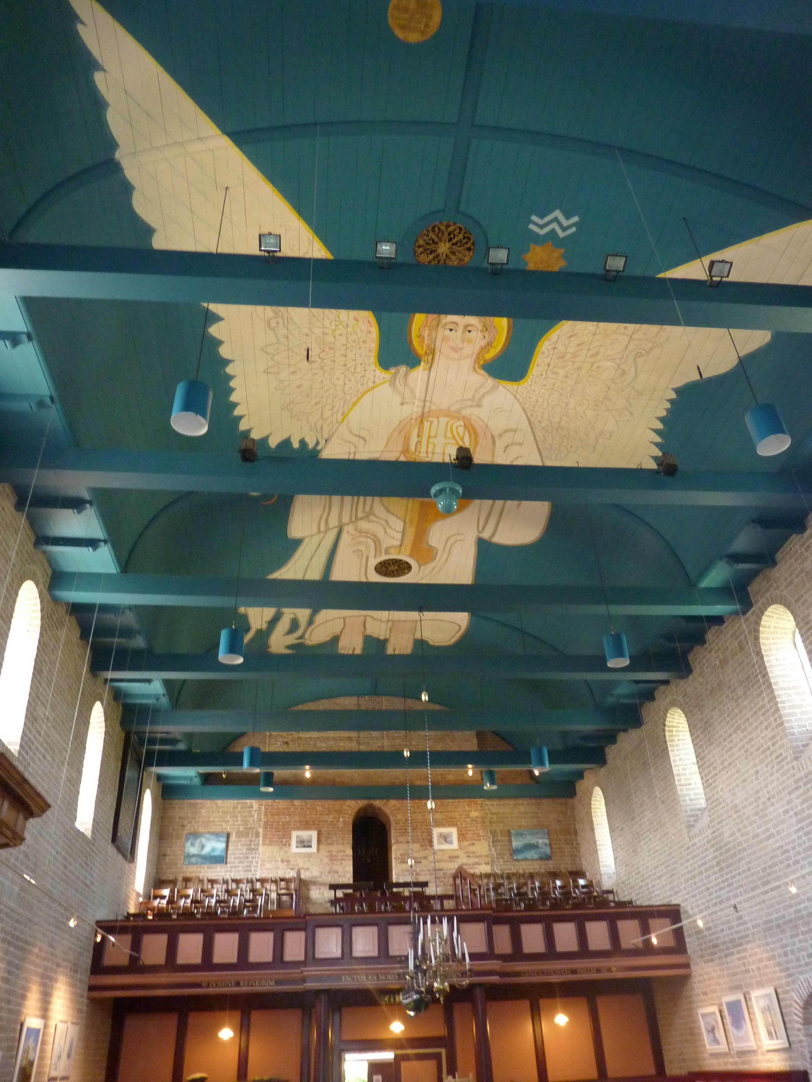 plafond kerk Oosterland